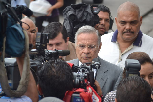 Ex presidente y secretario general de la OEA, Miguel Ángel Rodriguez, condenado a 5 años de prisión por casos de corrupción en el juicio ICE-Alcatel